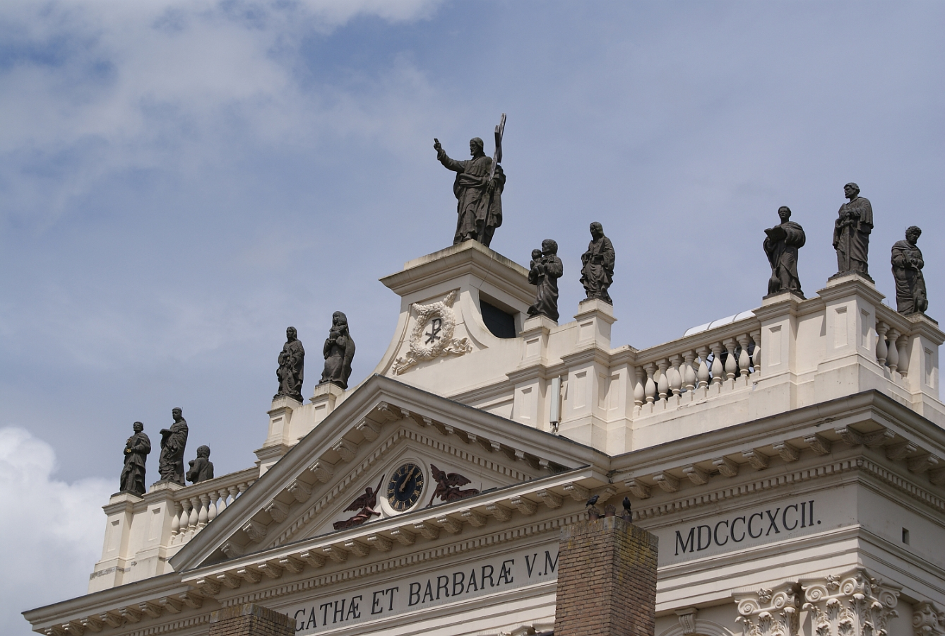 Basiliek St-Agatha & St-Barbara (Oudenbosch) - Beeld Salvator Mundi (in het midden) gemaakt door Frans De Vriendt (Borgerhout) (circa 1890)